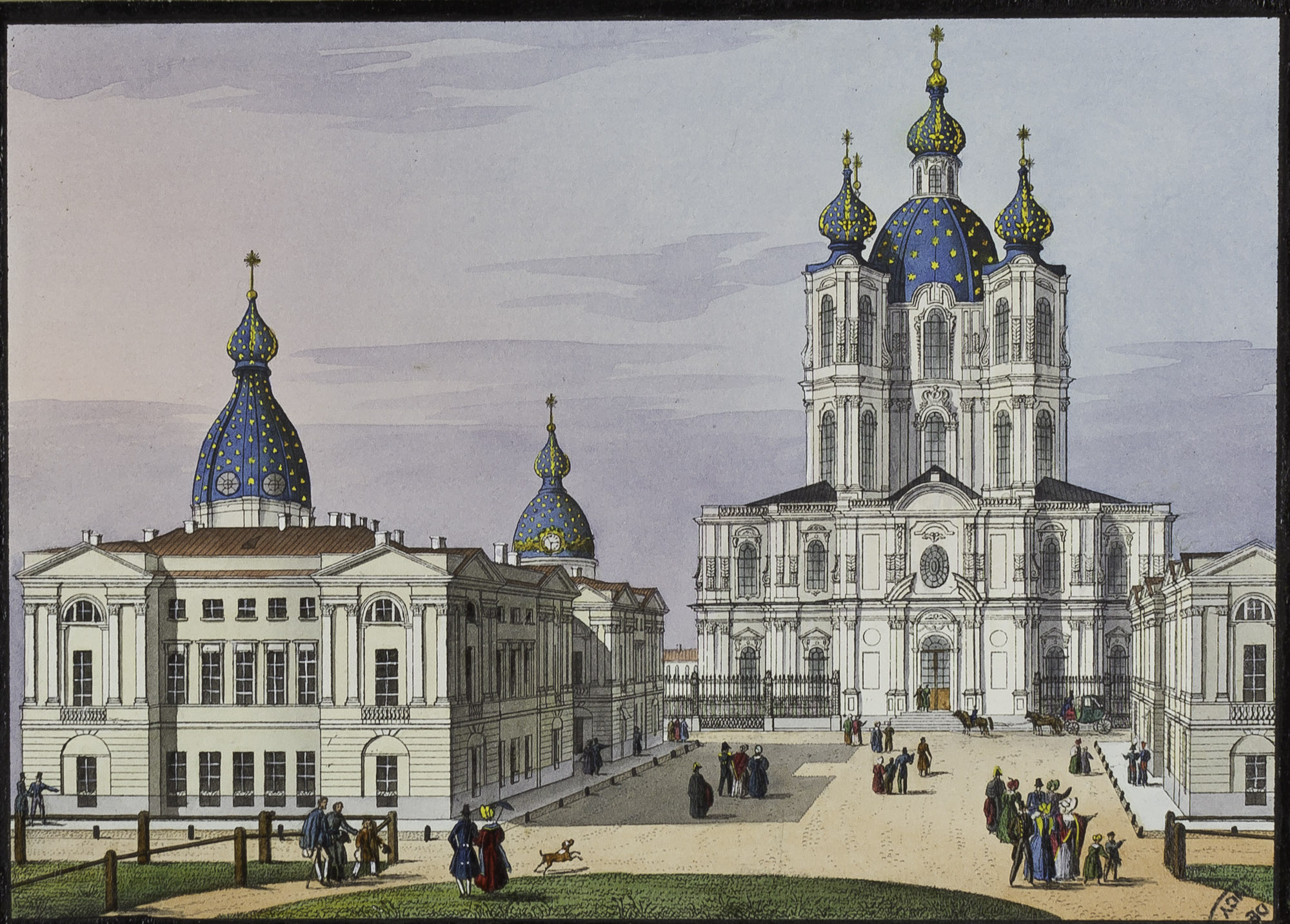 Enluminure de Ch. Beggrow, Saint Petersbourg.